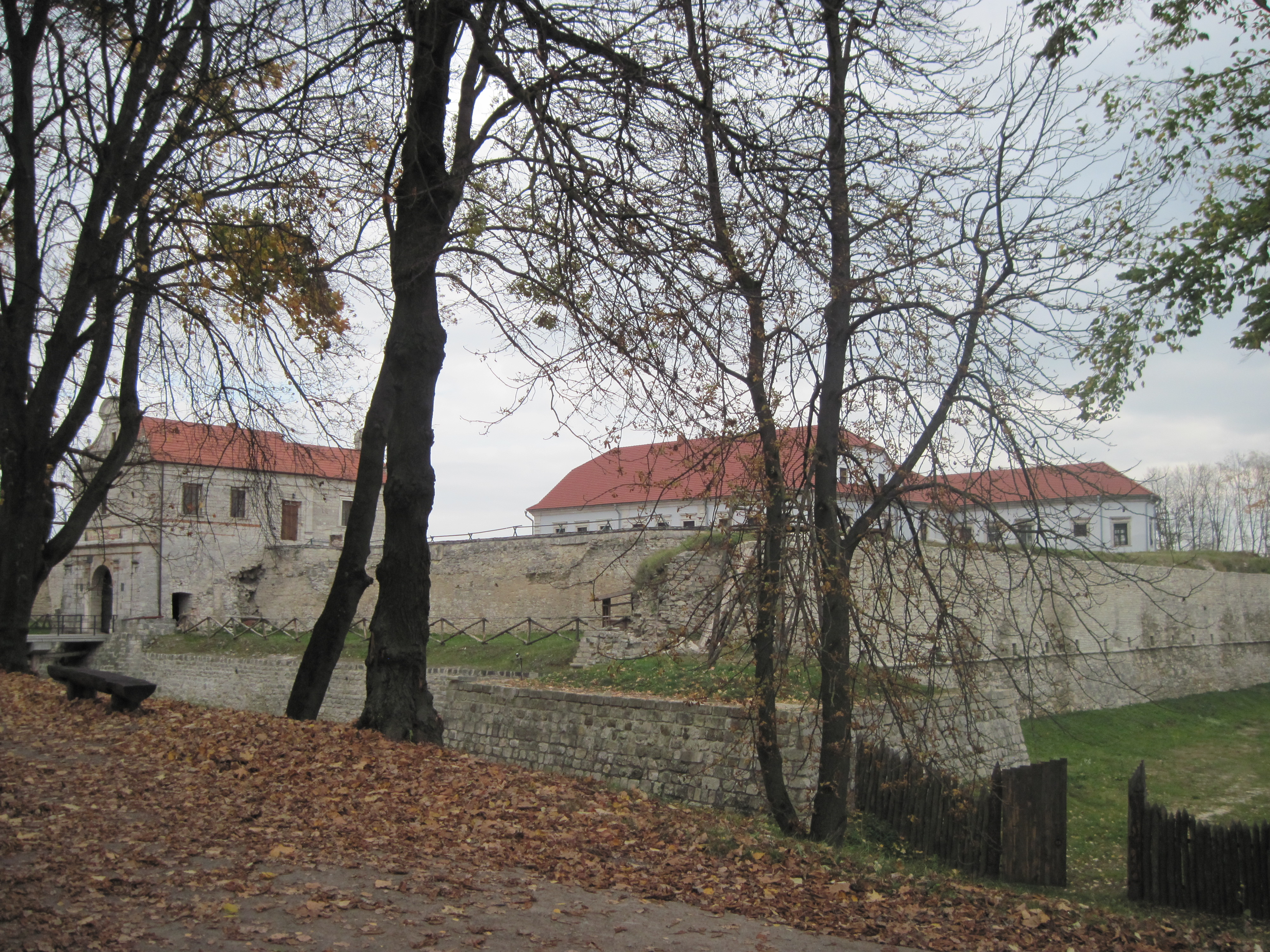 Збар. замок